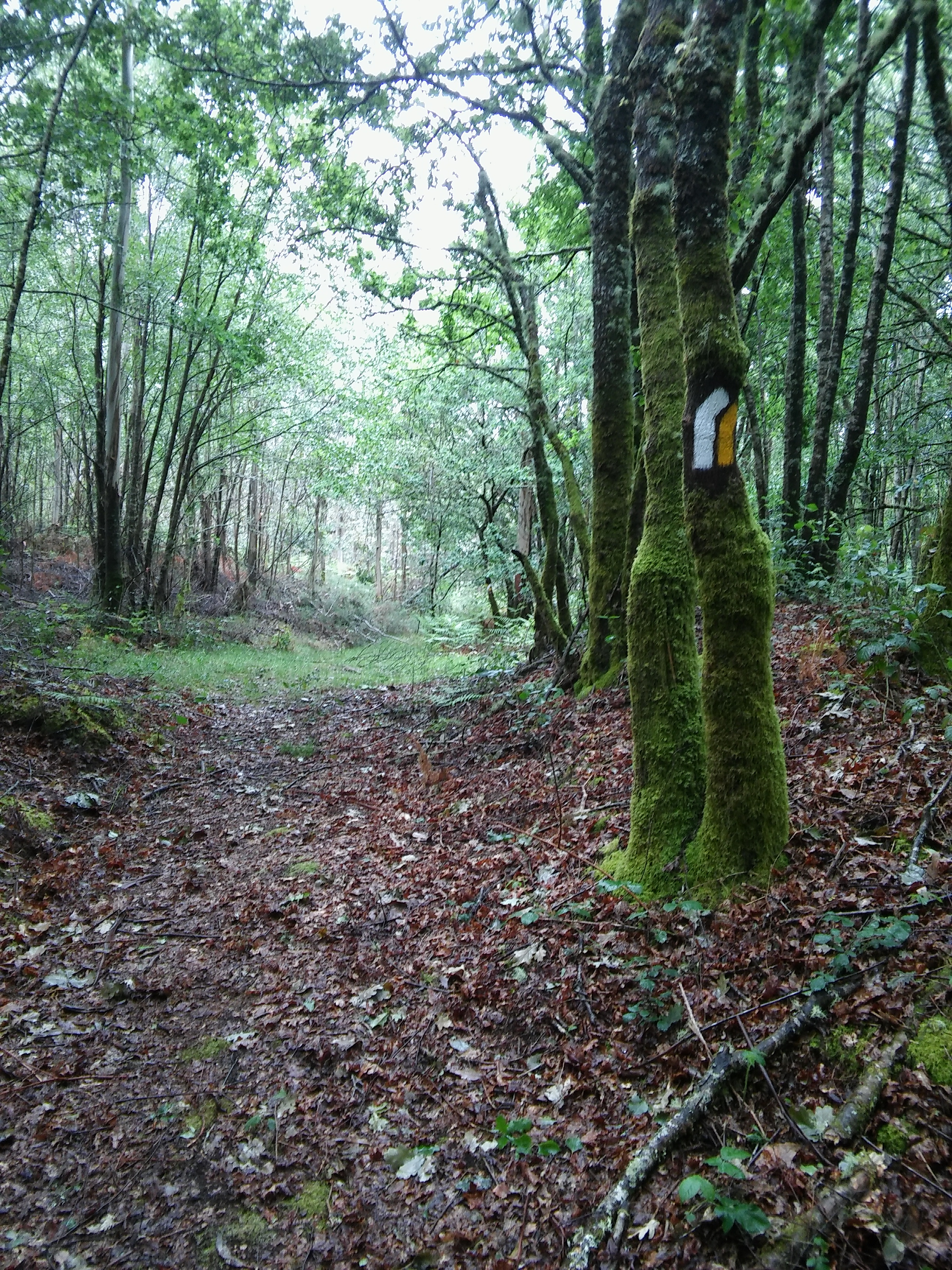 Camino